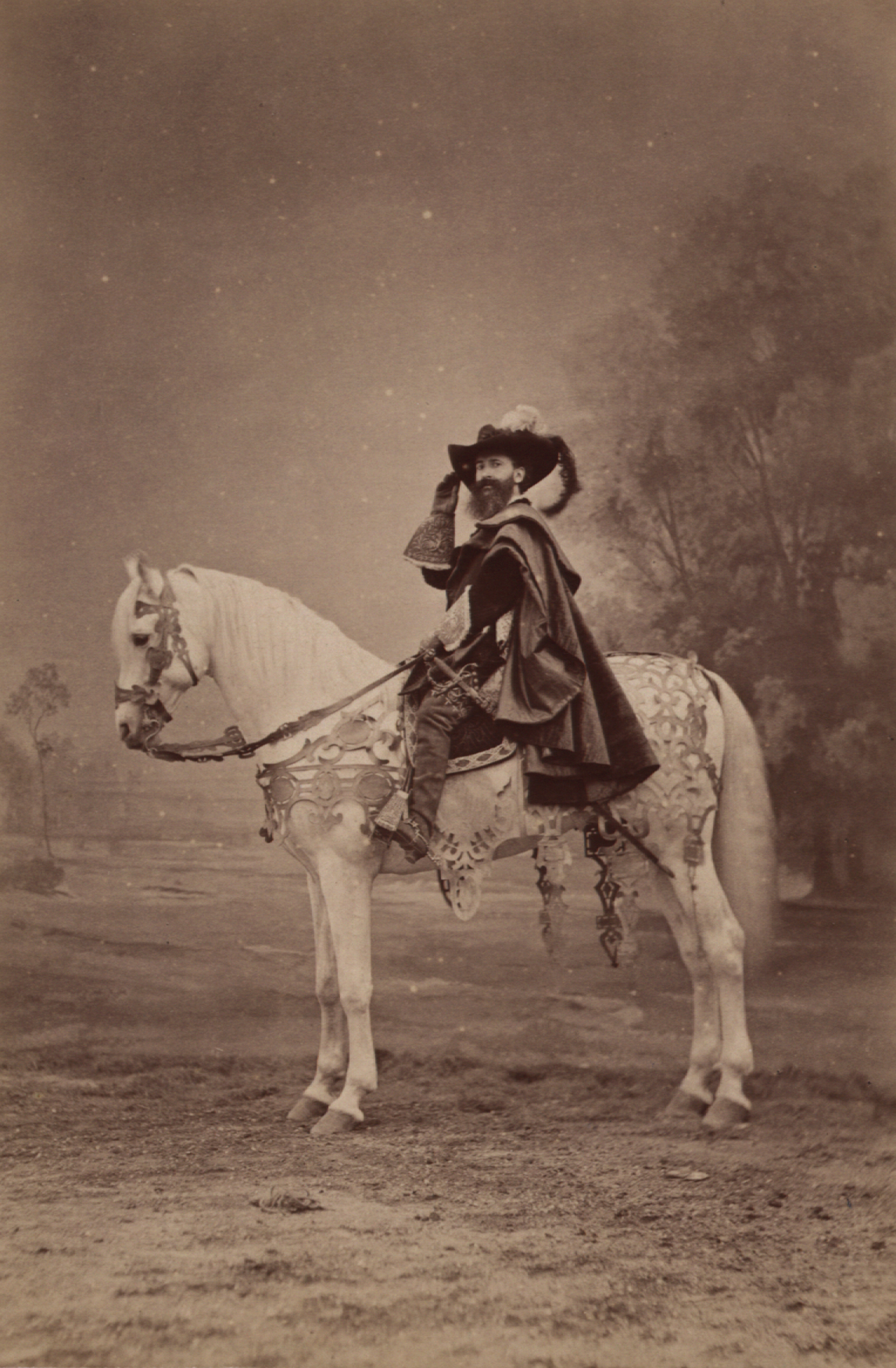 Hans Makart zu Pferde beim Festzug 1879, Gruppe "Künstler"